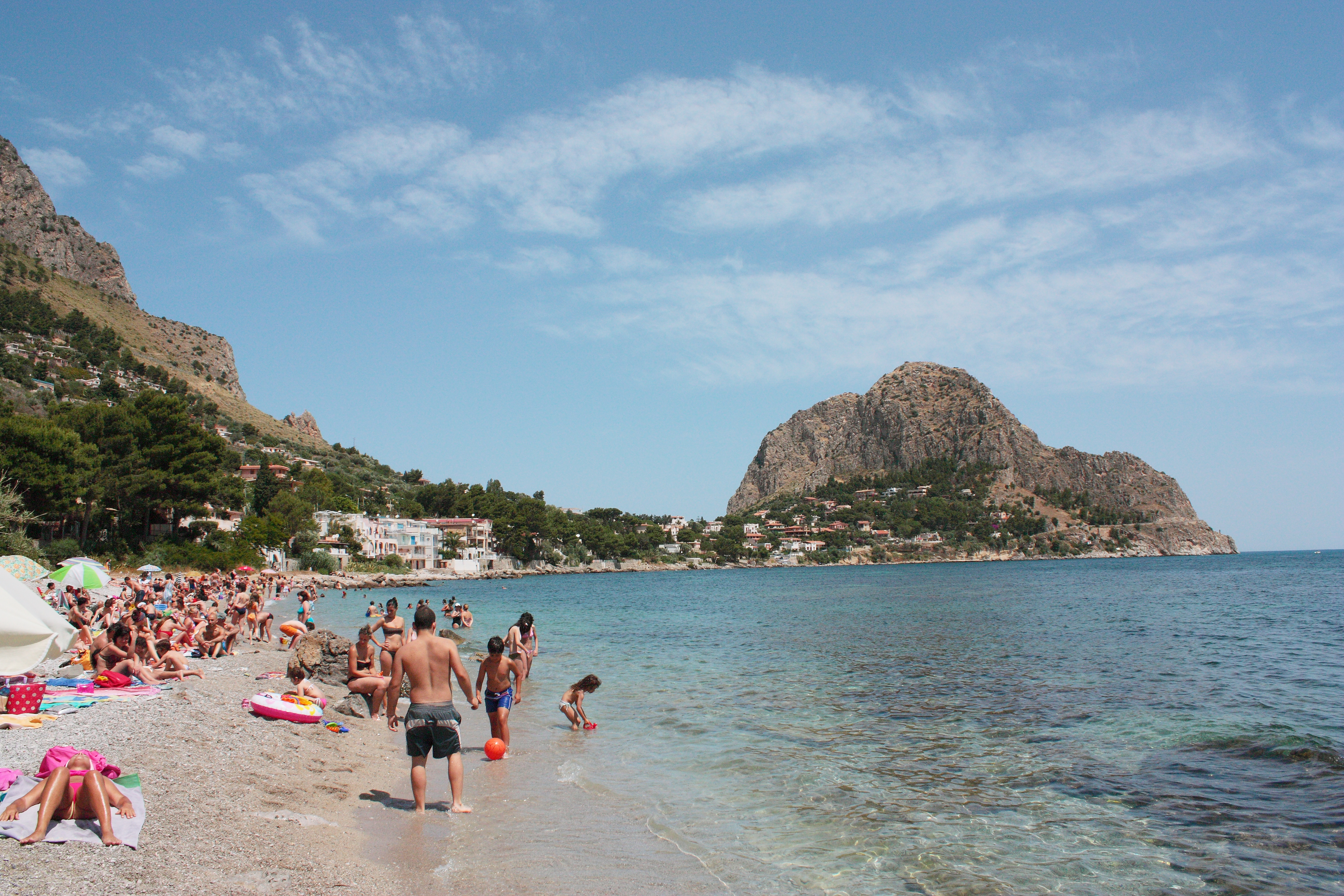 S. Flavia, giugno 2009